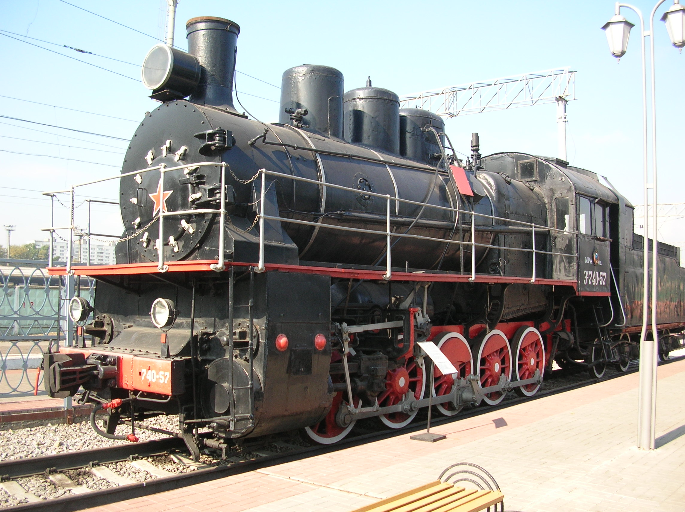 Russian steam locomotive Em74-57 (Эм740-57). Moscow railroad museum.